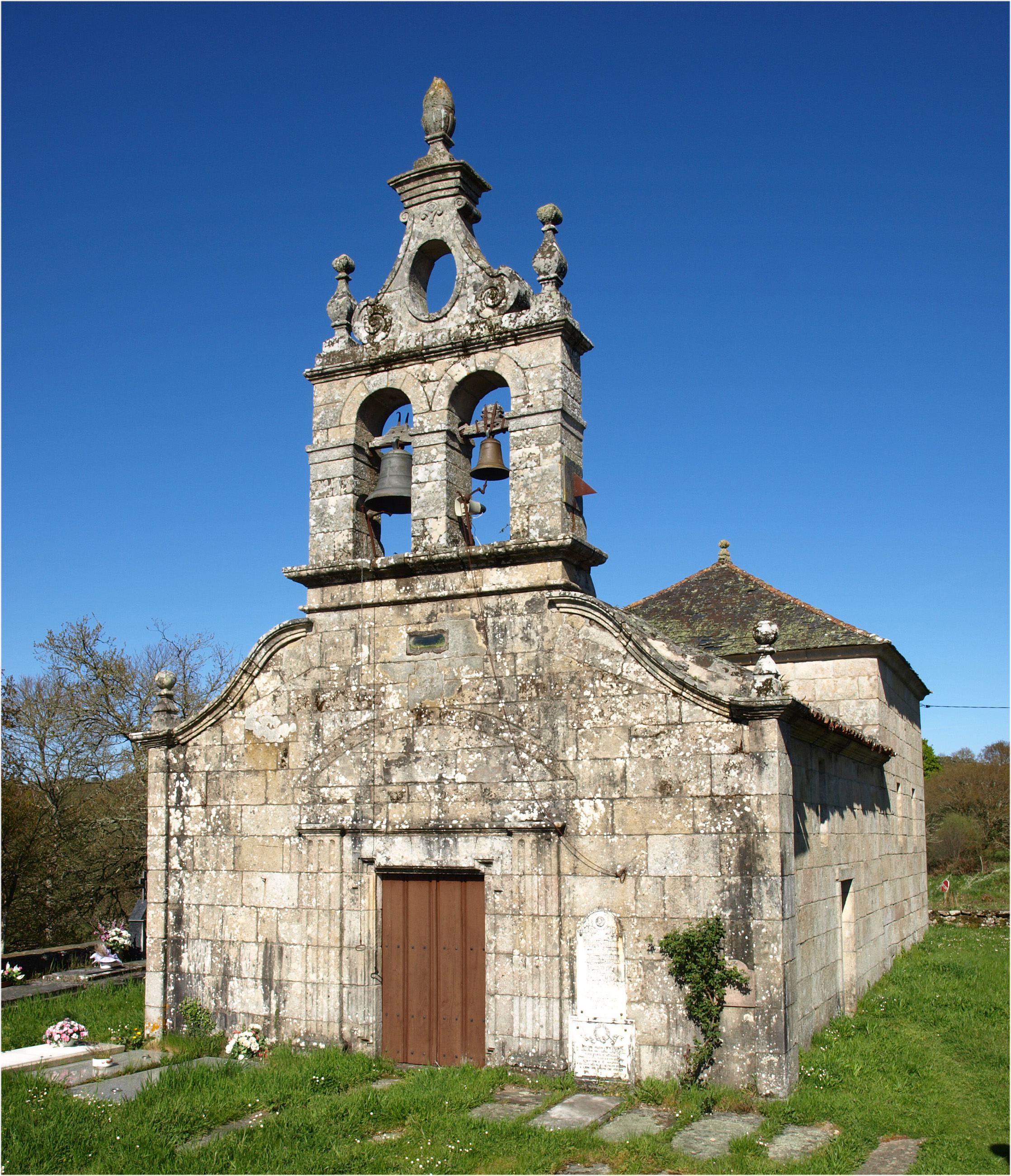 Igrexa Parroquial de Arada (Monterroso)